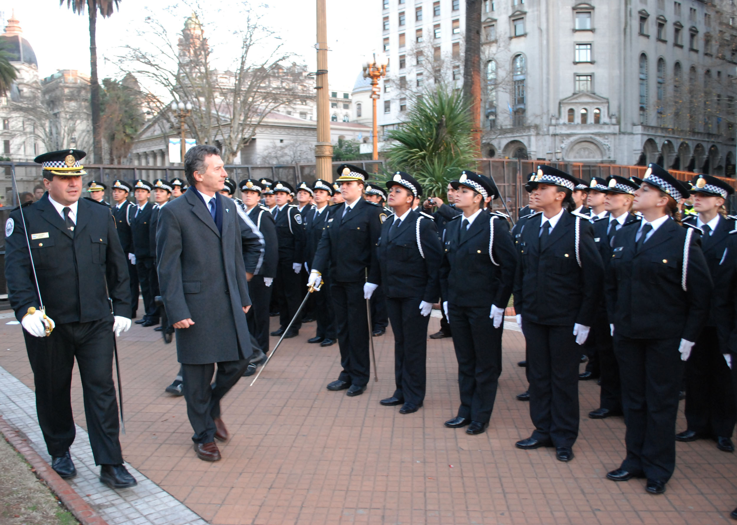 Buenos Aires - El Jefe de Gobierno de la Ciudad de Buenos Aires, Mauricio Macri, pasa revista a los cadetes de la Policia Metropolitana, en la ceremonia de jura la Bandera, que se realizó en Plaza de Mayo. Foto Mónica Martinez-gv/GCBA.